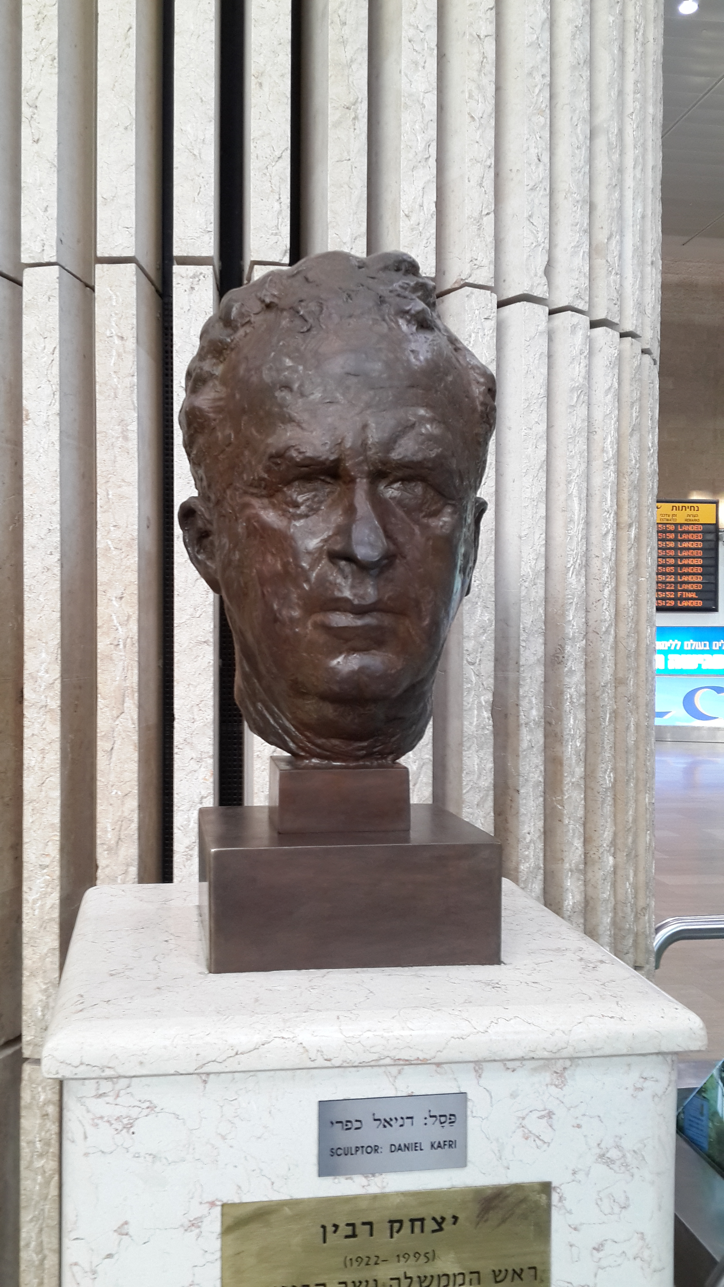 Бюст Рабина в аэропорту Бен Гуриона